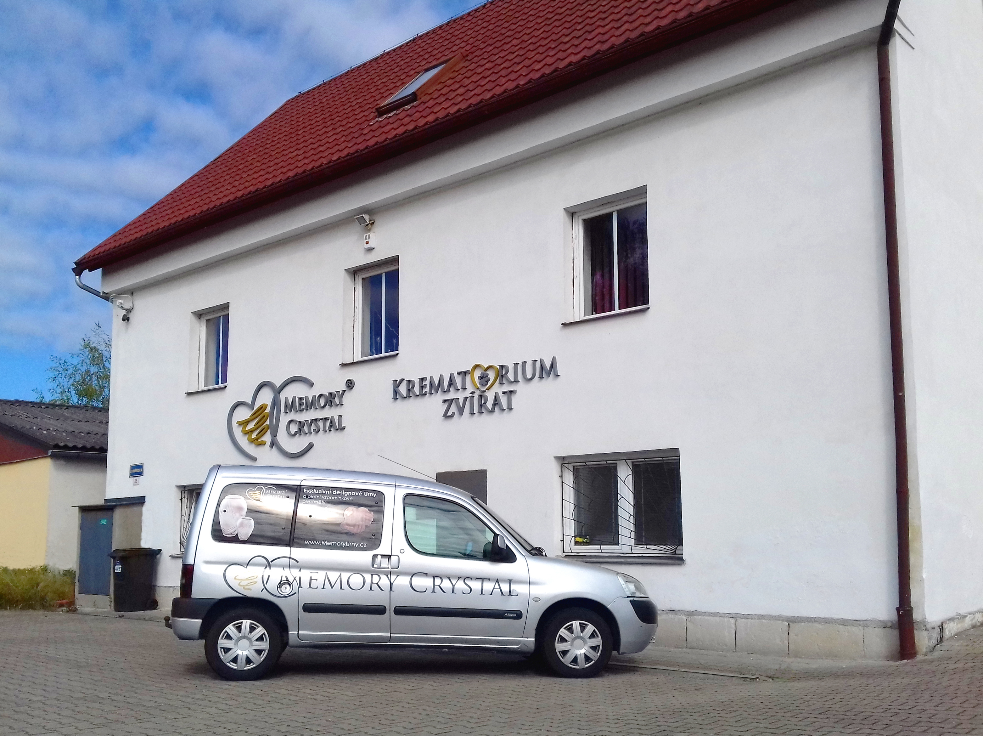 Krematorium zvířat Česká Lípa sídlí na adrese Dubice 32, Česká Lípa